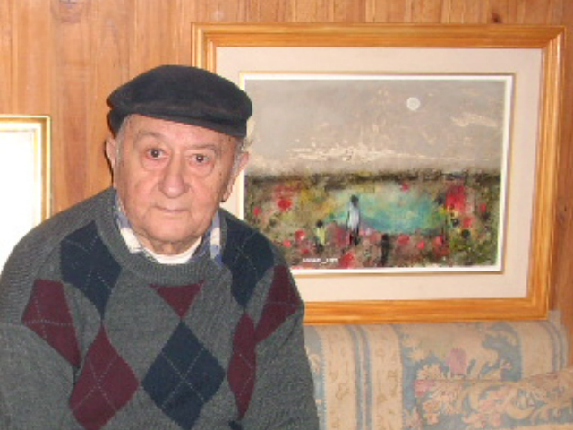 El artista junto a una obra de su última etapa